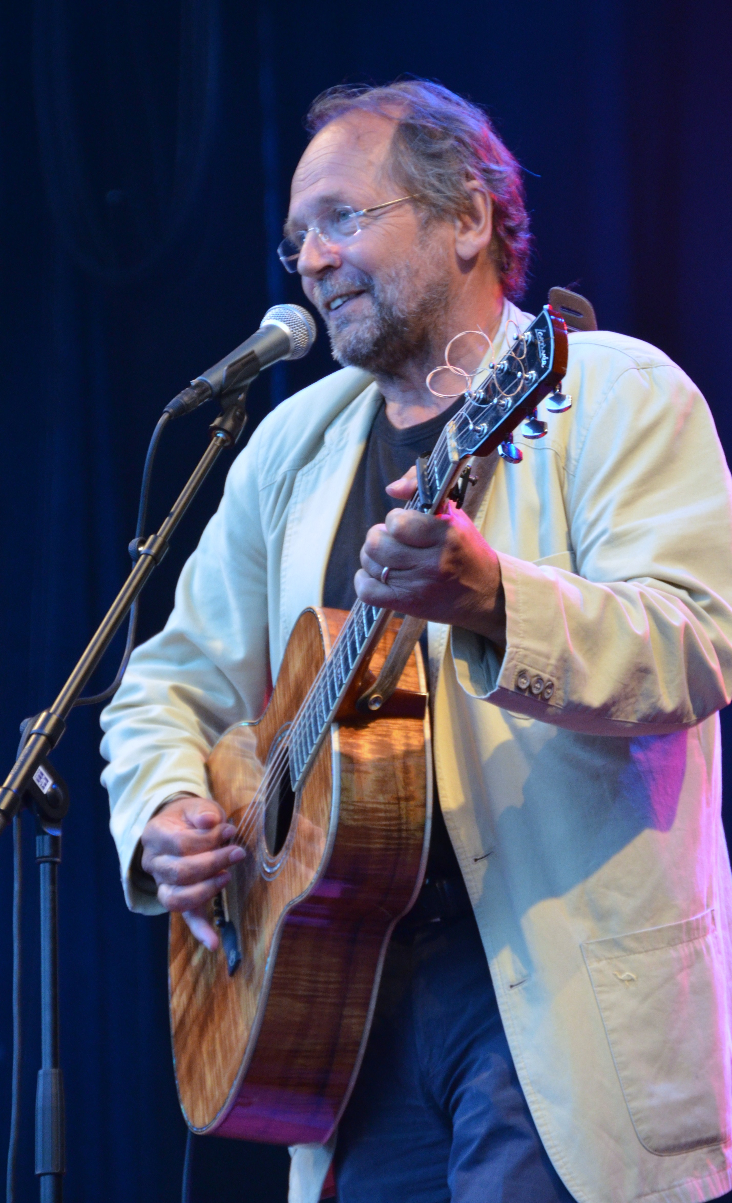 Ole Paus